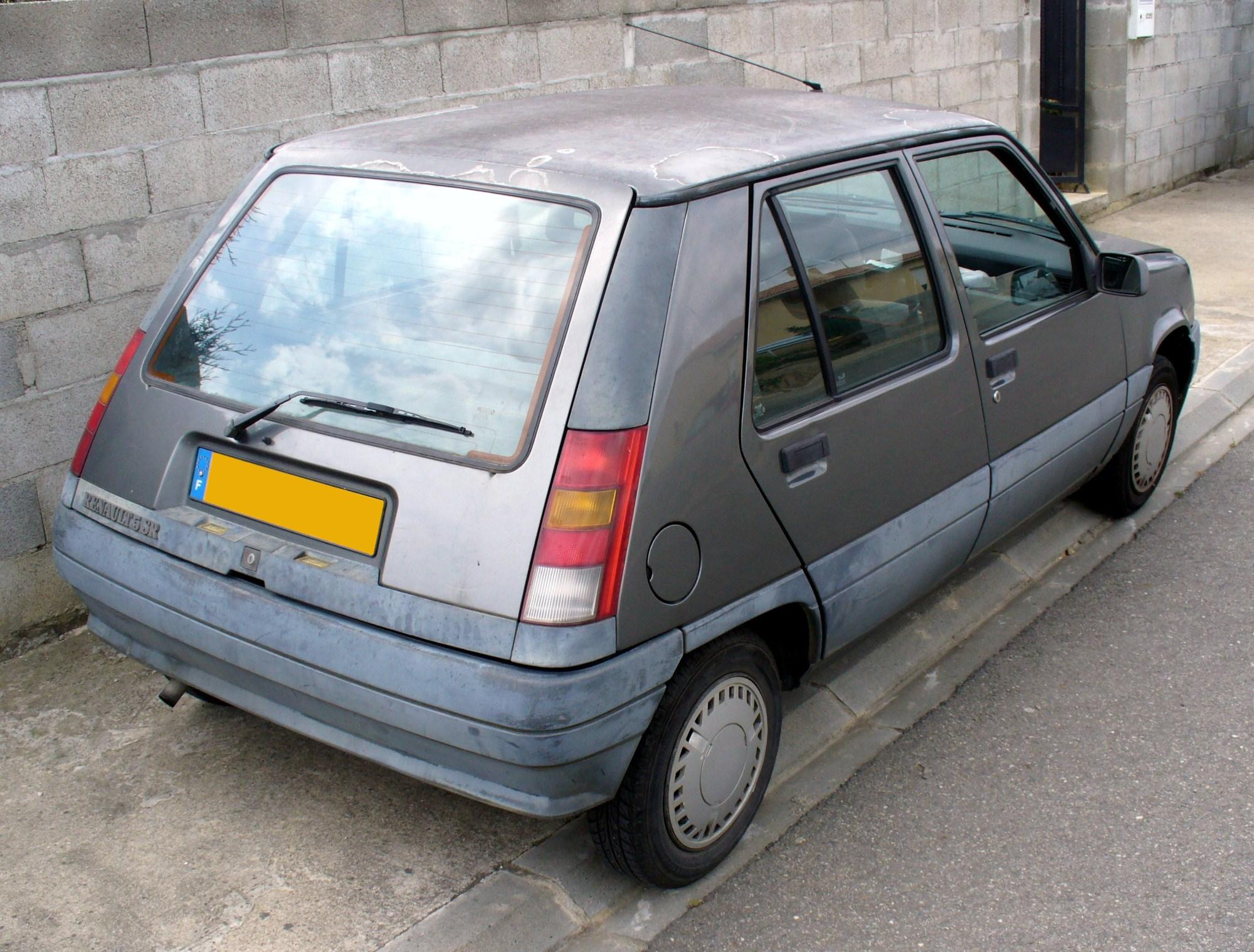 Renault 5